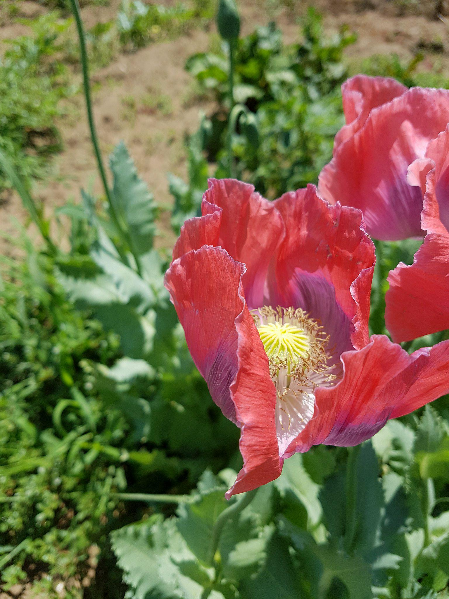 Mák virág